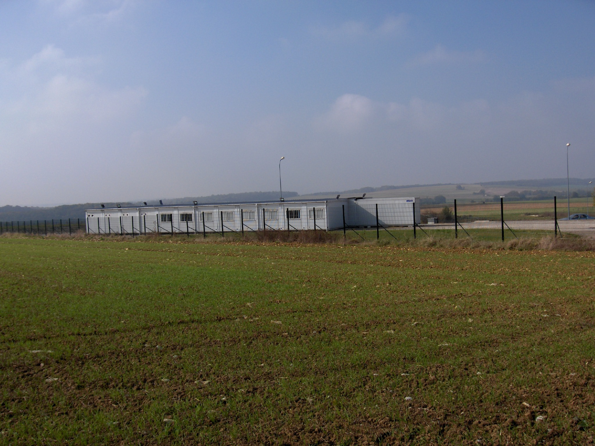 Village d'entreprises à Saudron (Haute-Marne). Il regroupe les entreprises qui interviennent sur le site de l'ANDRA et sert leurs besoins. Ces installations sont moins nombreuses maintenant.